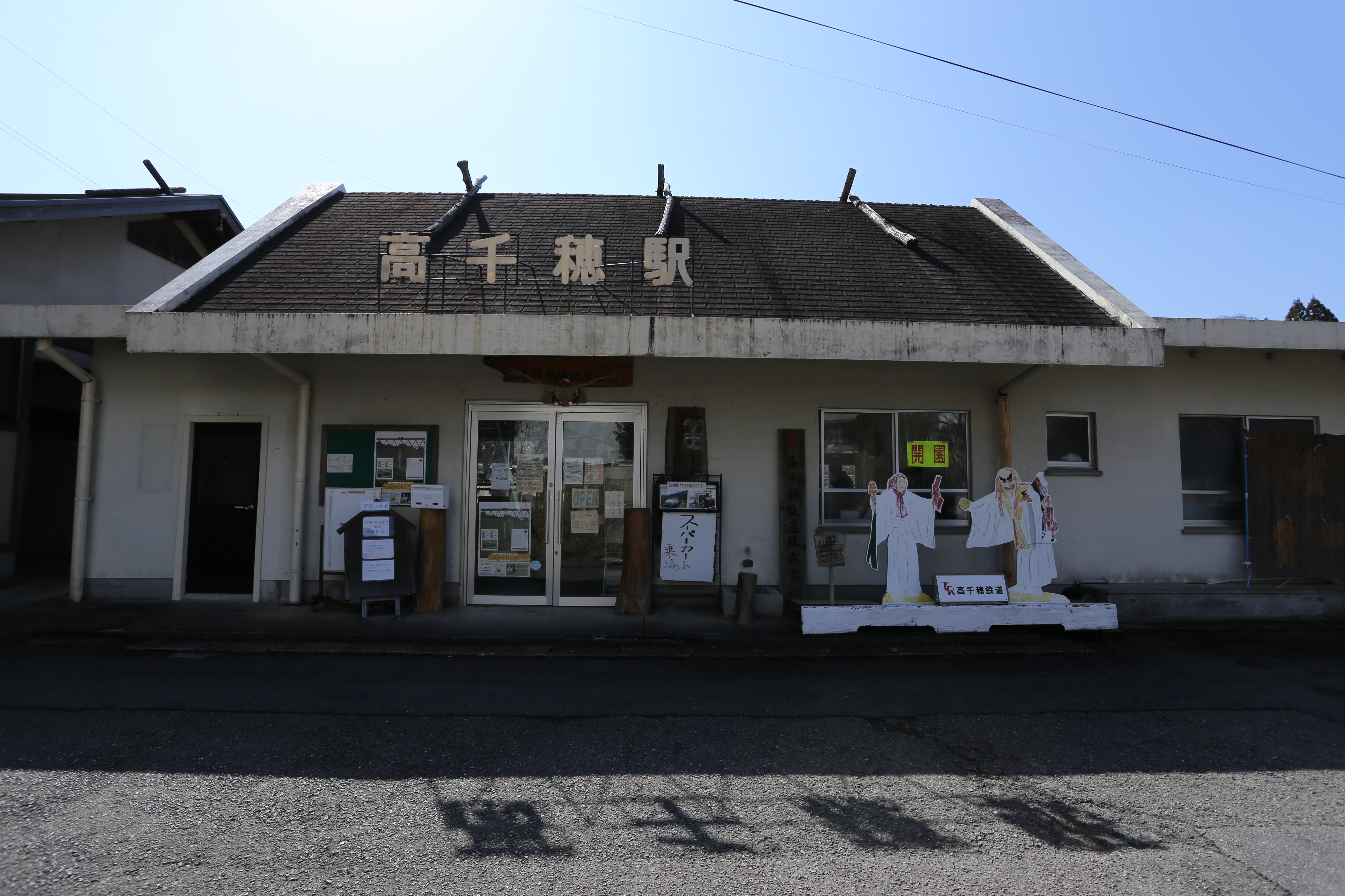 高千穗駅